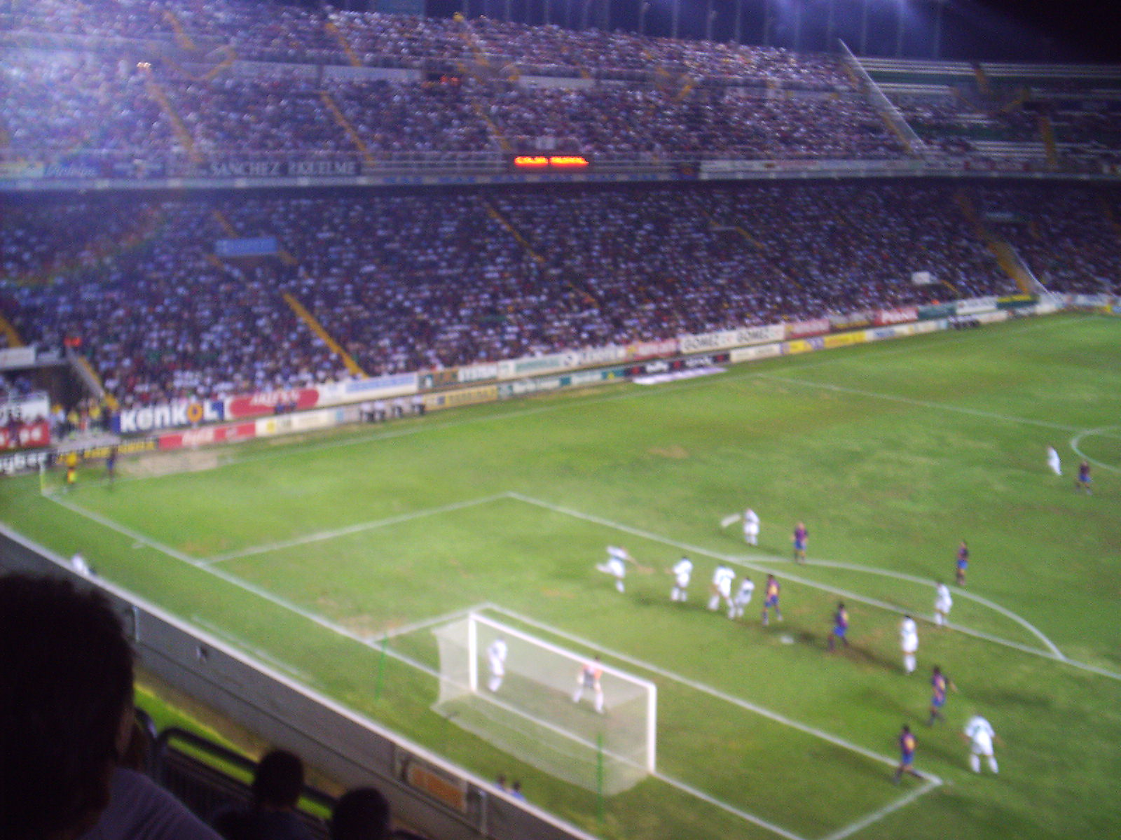 Photo du match entre le Elche CF et le FC Barcelone en 2003